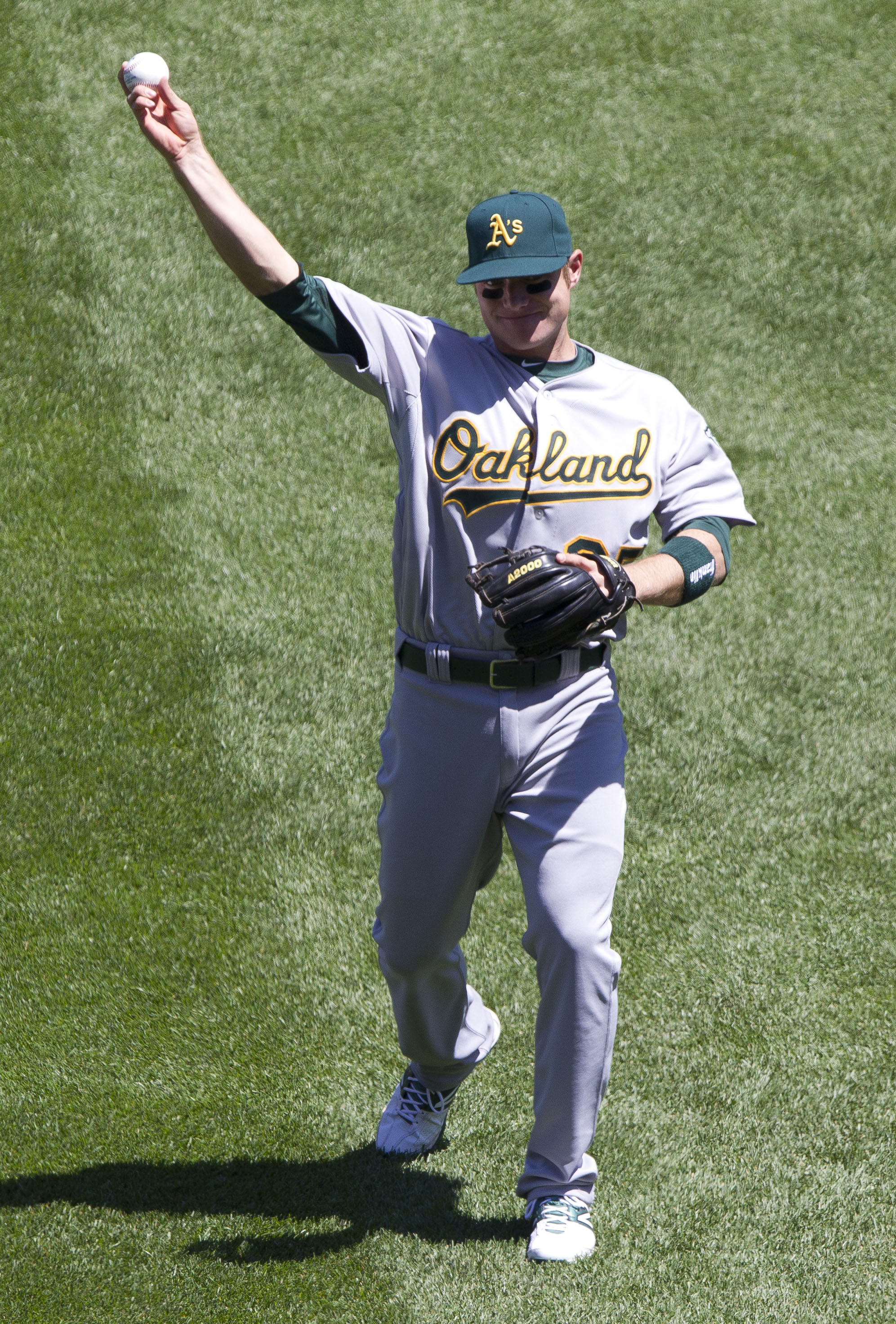 Luke Hughes